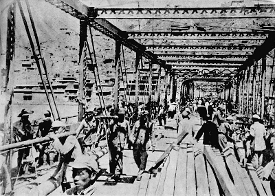 1949年8月27日至9月6日，中国人民解放军与工人一起抢修中山桥。